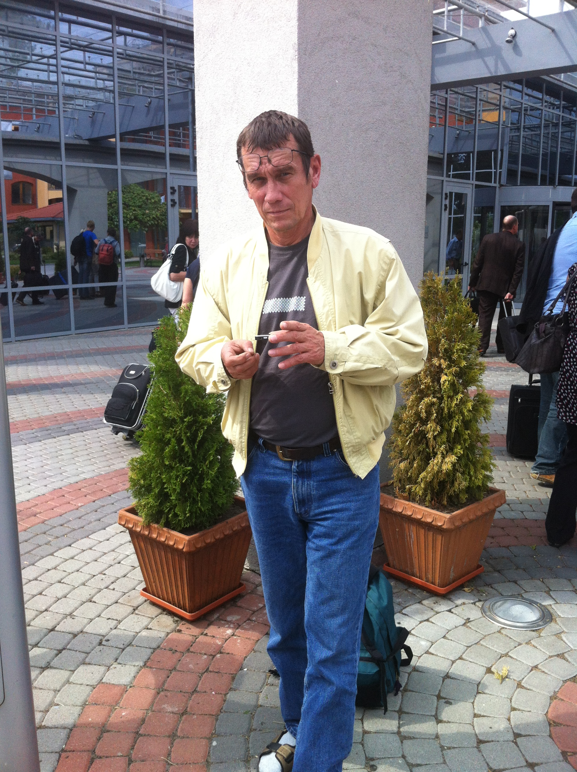 Kaido Kama 2012. aastal VI soome-ugri rahvaste maailmakongressil Siófokis.